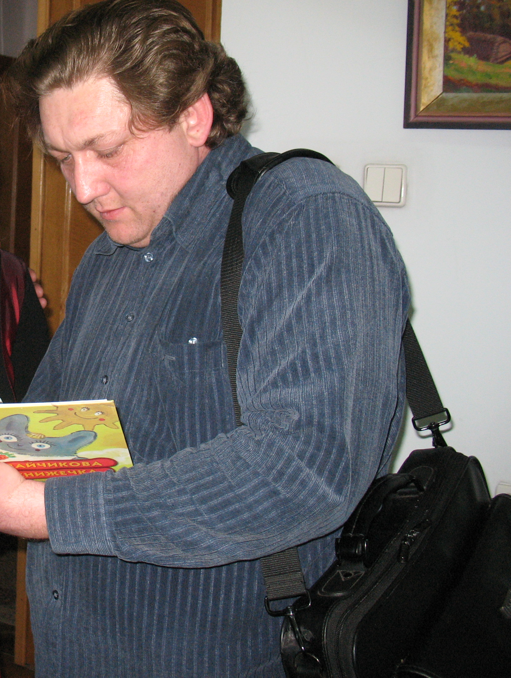 Український письменник Іван Андрусяк, 2008 рік